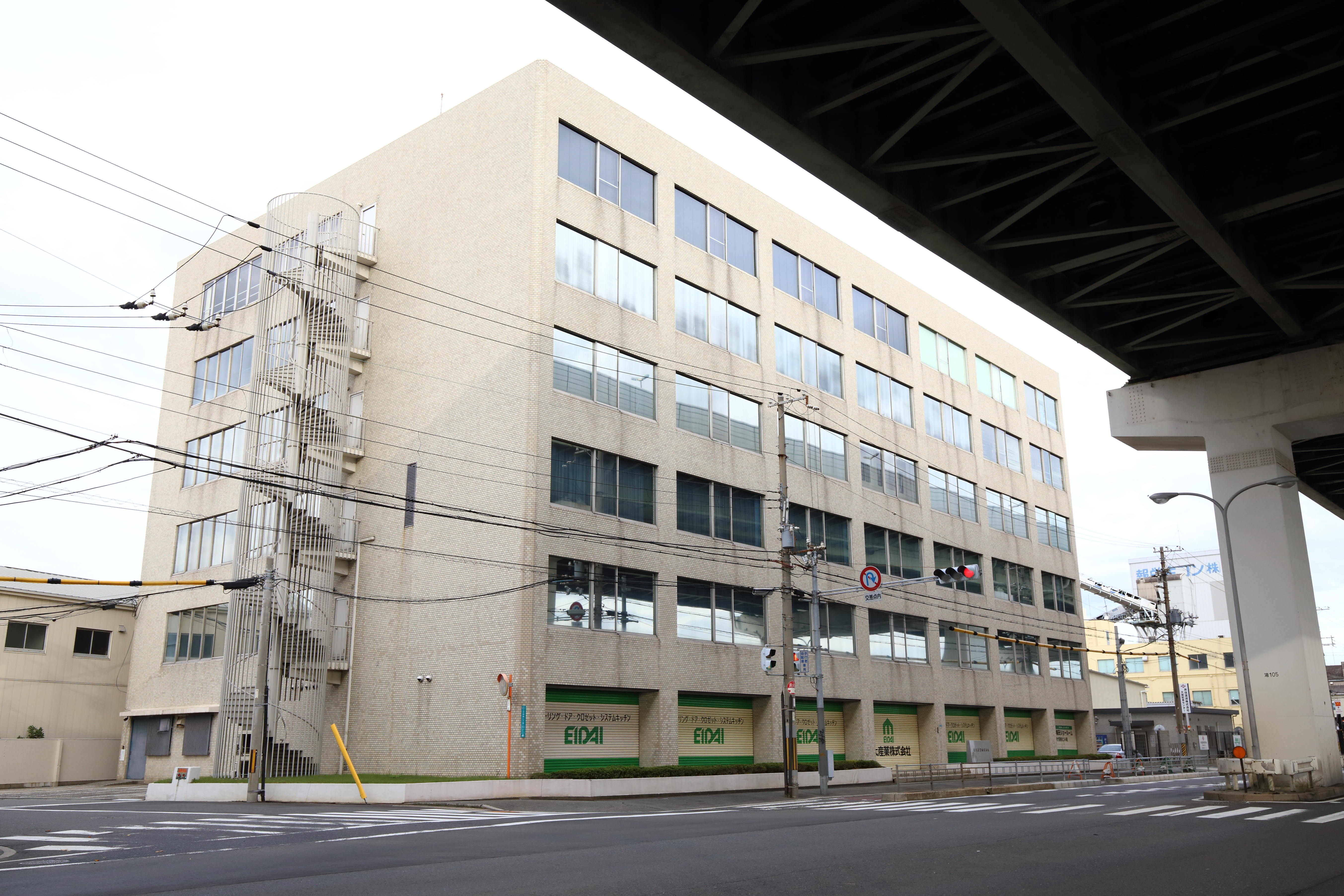 永大産業株式会社 大阪市住之江区平林南2丁目